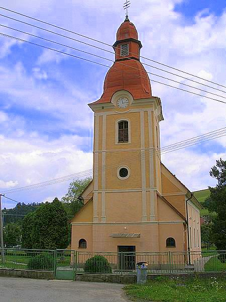 Bajerov obec v Šarišskej vrchovine, okr.Prešov, región Šariš